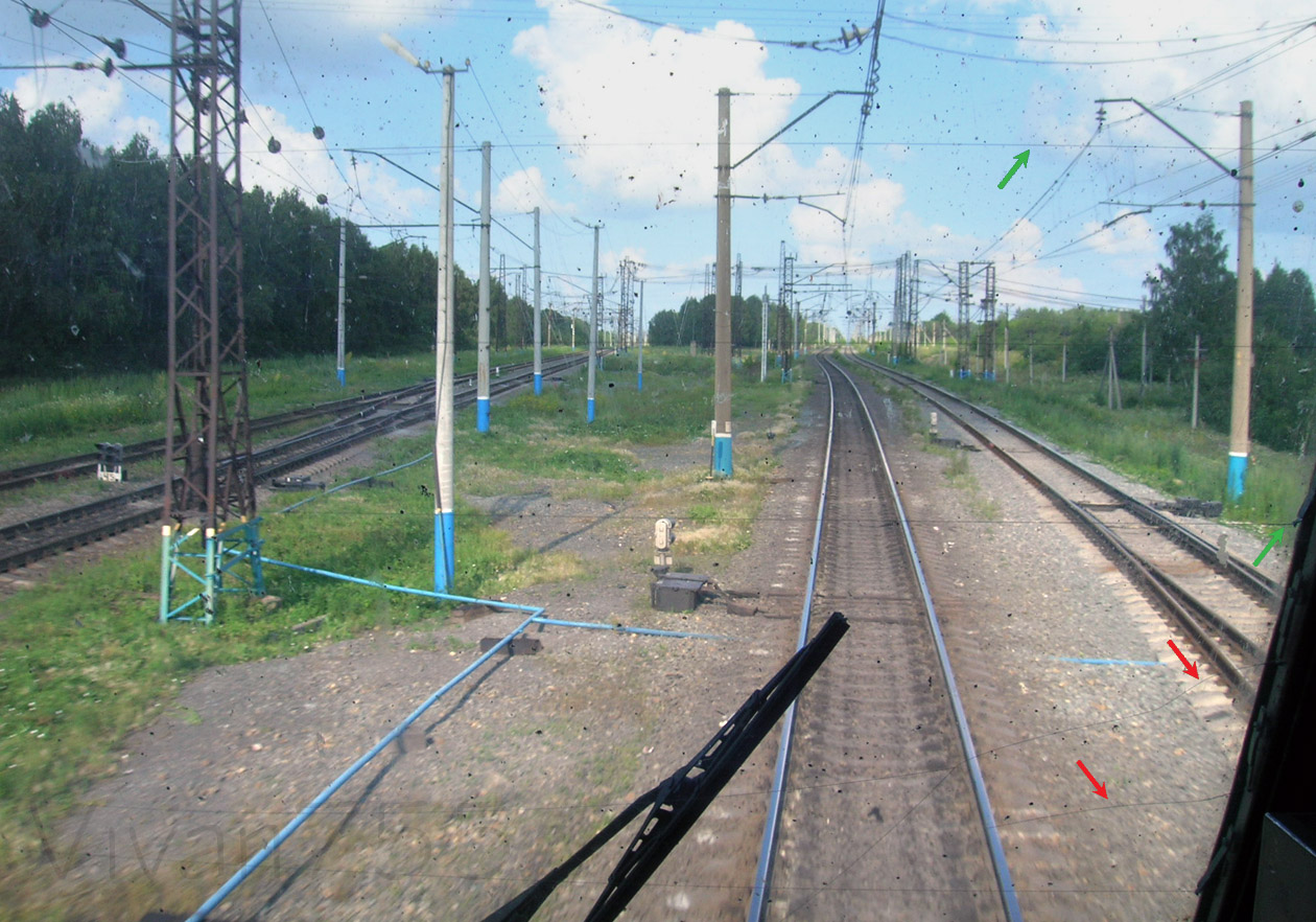 Лобовое стекло электровоза ЧС7 раннего выпуска, оборудованное проволочным электрообогревом